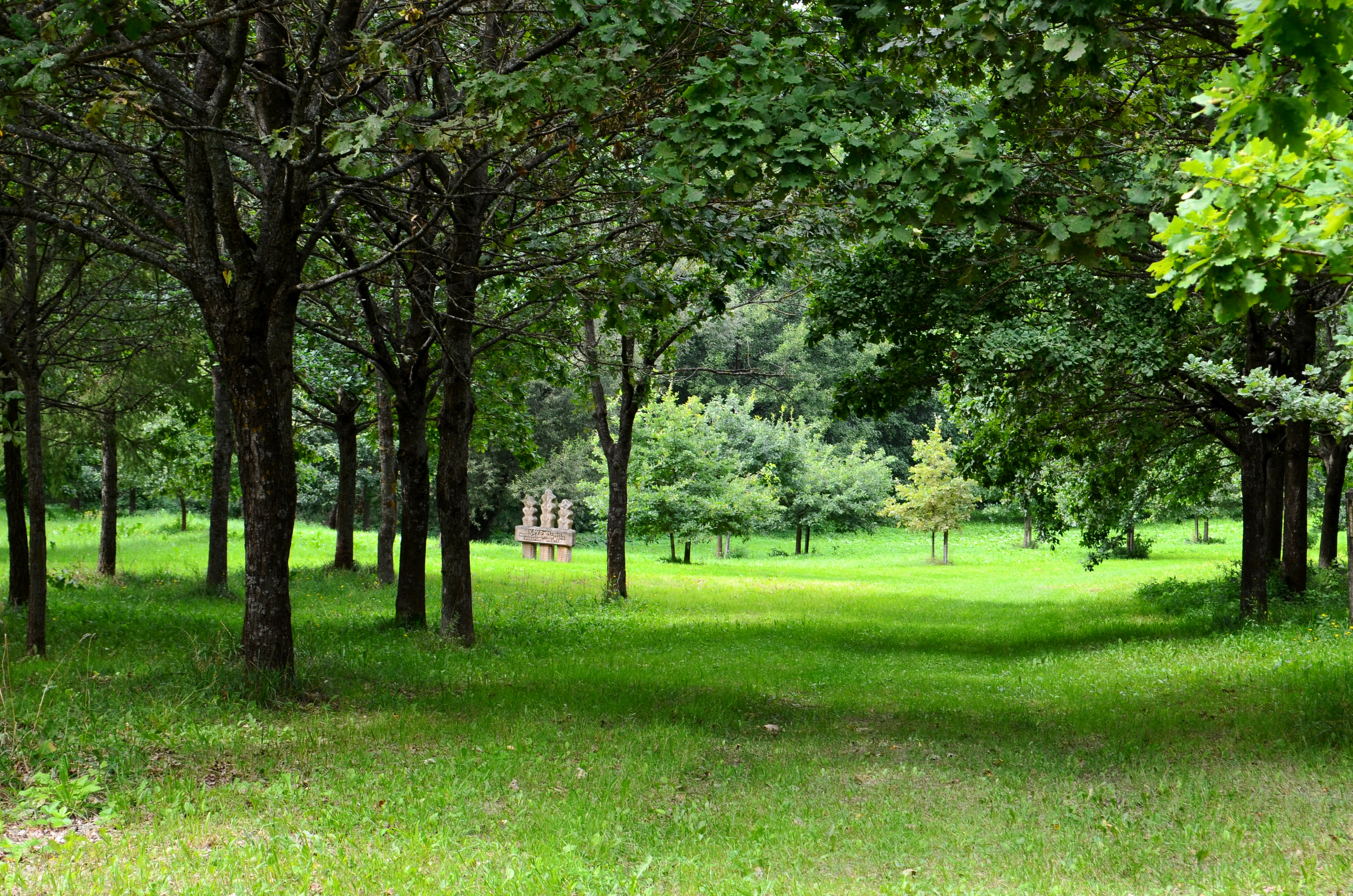 J. Basanavičiaus sodybos ąžuolynas, Ožkabaliai, Bartninkų sen., Vilkaviškio raj.